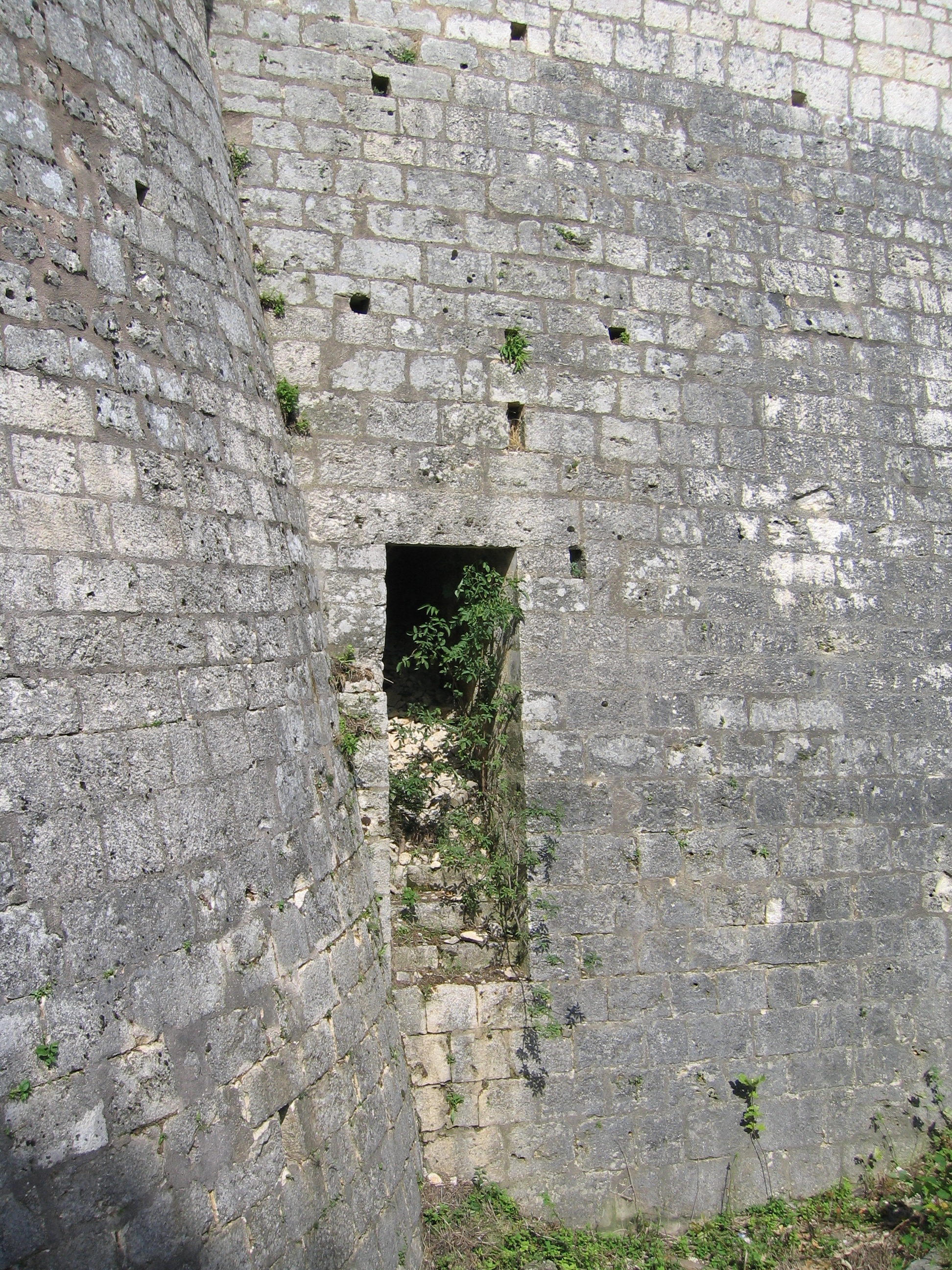 Poterne dans les remparts, ville de Provins